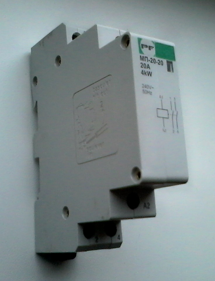 Знято мобілкою Самсунг